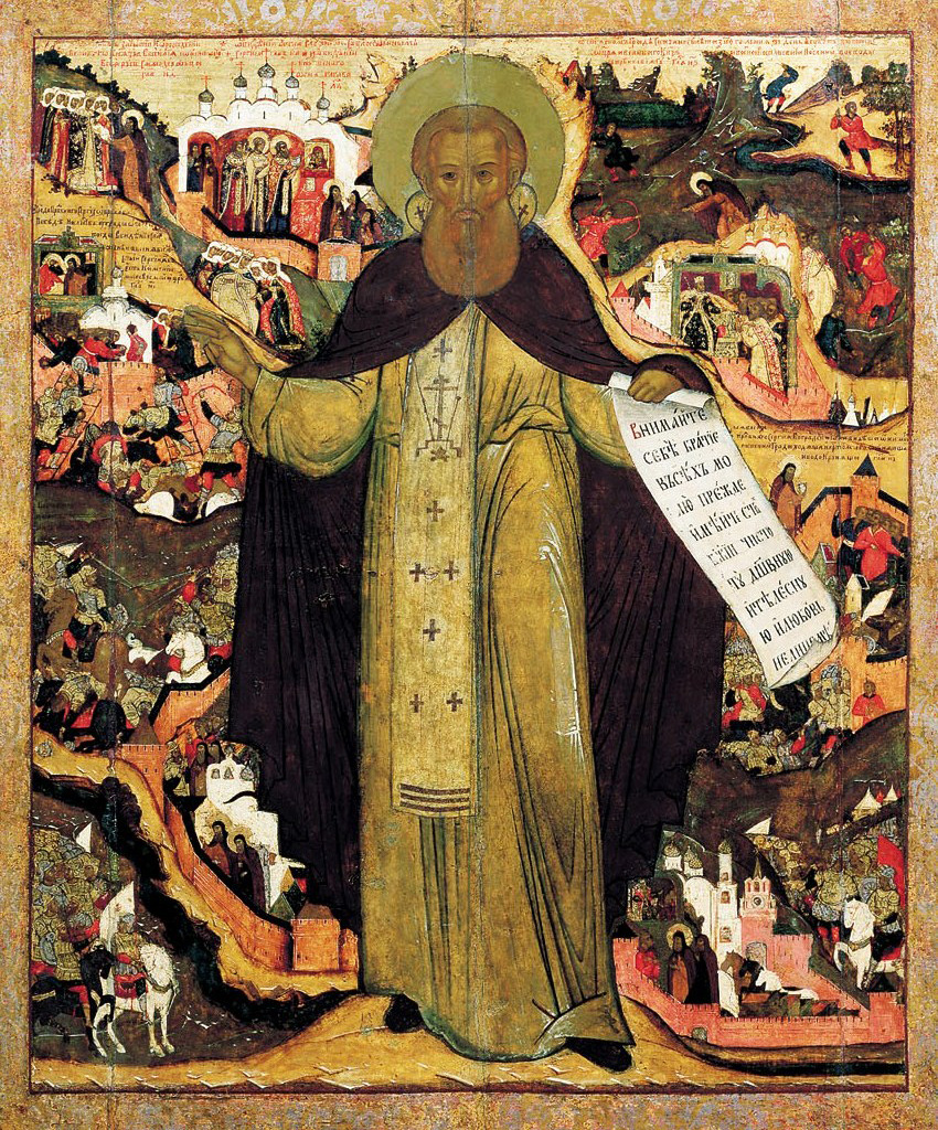 Сергий Радонежский, с житием. Средник иконы. Ярославль. Середина XVII в.